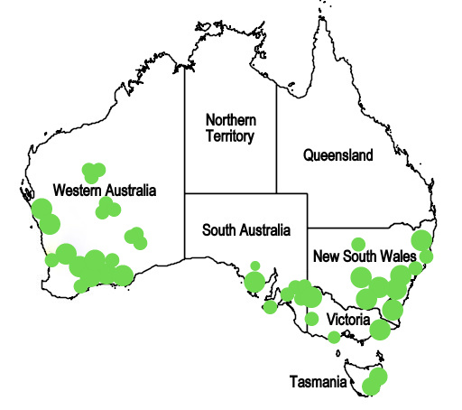 Cyphanthera Miers, 1853 (Solanaceae, Anthocercideae) - Mapa de distribución geográfica del género.